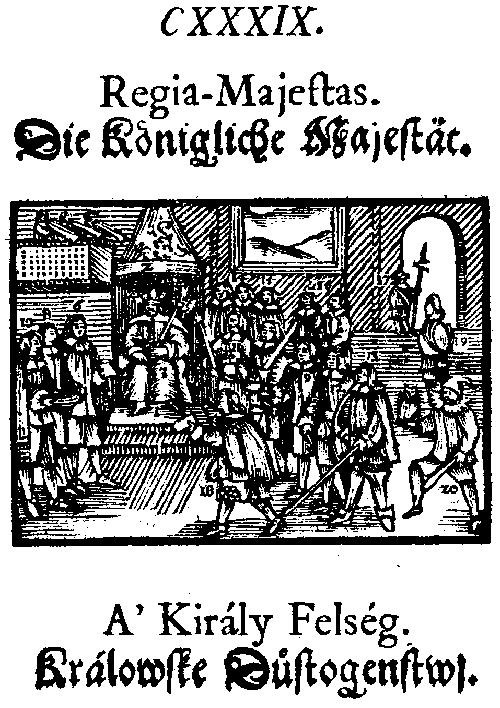 Nemes inasok (15.) a királyi udvartartáson belül. Képfelirat: A' Király, 1 királyi méltoságában, ül az ö királyi székében, 2 jeles (ditsöséges, méltoságos) öltözetben, 3 fel-ékesittétvén koronával, 4 tartván kezében királyi pálczát, 5 környül vétettetvén udvar-néppel. Ezek között a' legföjebbek, a' Kanczellárius, 6 a' Tanácsokkal, és Secretáriusokkal; (titok iródeákokkal eggyütt) az Udvari-Hadnagy, (biró) 7 a' Hop-Mester, 8 a' Pohárnok, 9 az Asztalnak, (Tálnak) 10 a' Kints-tartó, 11 a' Fö-Komornik, 12 és a' Lovász-mester. 13 Ezek után következnek az udvari fö emberek, (nemessek) 14 a' nemes Inasok, 15 a' Komornikokkal és futó (gyalog, gyors) inasokkal, 16 a' darabantok, 17 a' testet (életet) örzö (ud- vari) sereggel eggyütt. A' künvaló (idegen) követeket 18 meghalgattya audientziát ád nékik) nyilván. (pompássan) Máshová le-küldi a' vicéjit, (királyképeit) helette országlóit, Tisztartóit, gond-viselöit) számtartóit, és követit a' kiknek ottan ottan (egymás) után) küld uj parantsolatokat a' száguldó posták által. 17 A' Bolond (urbolondja) nevetséget indét csúfos tréfáival. A' Római Országban mindenekkel bir a' Császár a' ki a' gyüléskor választatik a' nyolcz császárválasztó herczegektül, ugymint, a' kik hárman egyházi személyek és Ersekek, a' Mogumiai, a' Tréviri, a' Koloniai, és ötön világiak, a' Cseh Országi Király a' fö-pohárnok, a' Baváriai Herczeg a' fö-tálnok, a' Saxeniai Herczeg a' Brandenburgumi határos Herczeg a' fö-Kamarás és a' Palatinus a' fö-Kints-tartó.